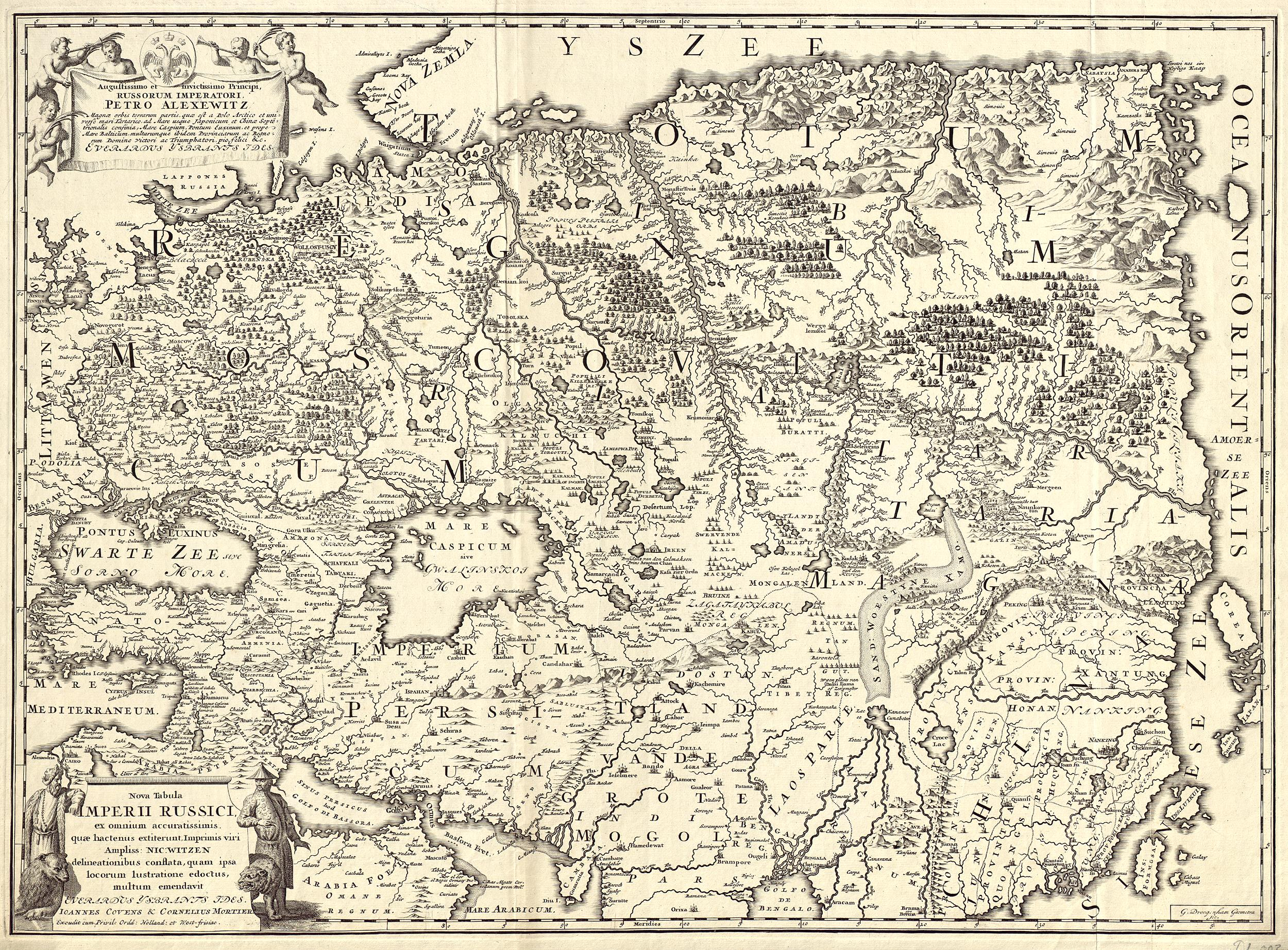 Nova Tabula Imperii Russici